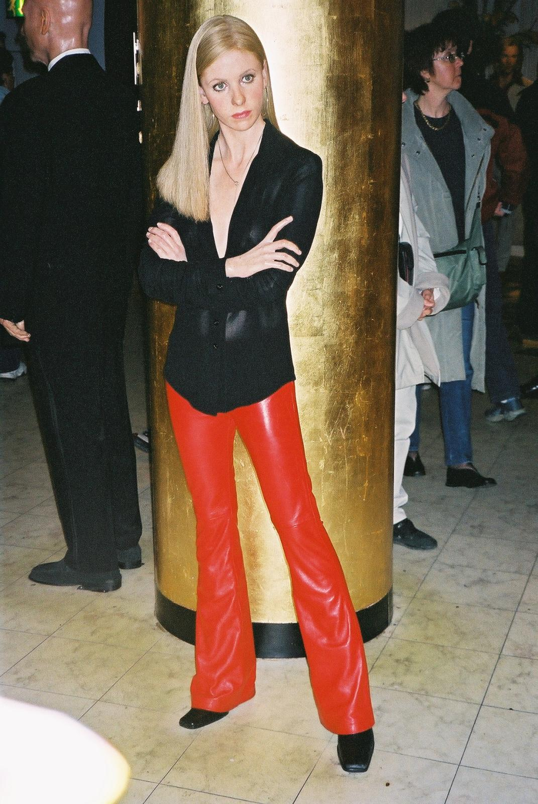 Statue de cire de Sarah Michelle Gellar au musée de Mme Thussaud à Londres.